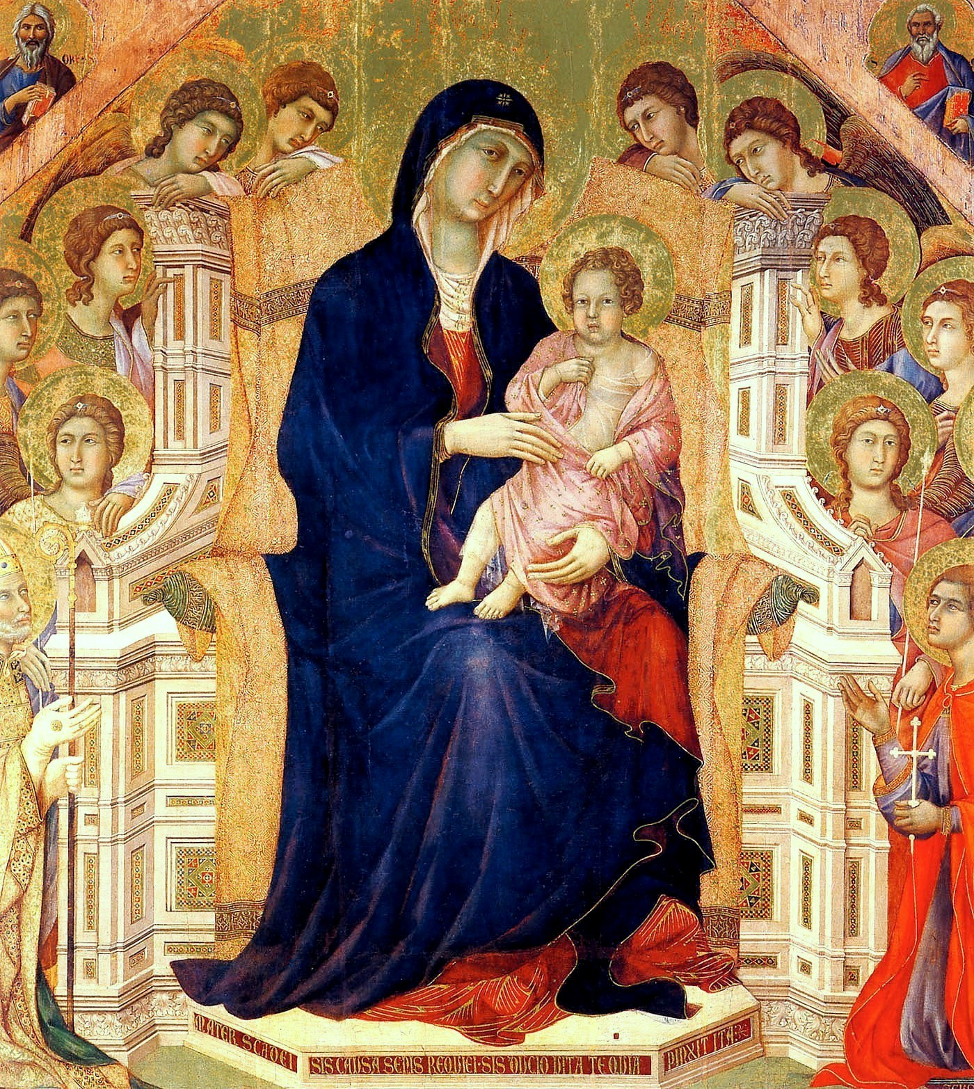 Maesta Duccio. detail